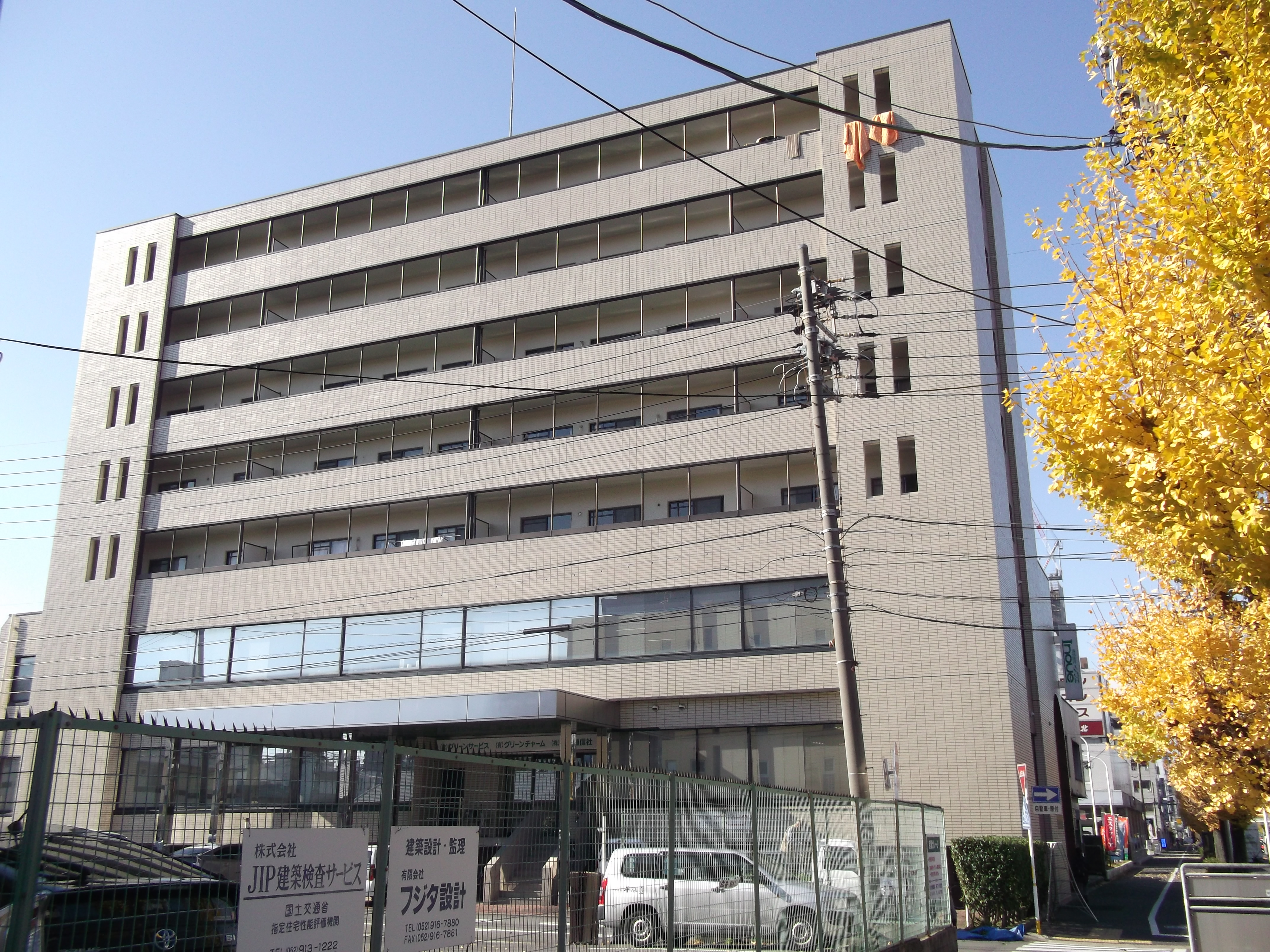 名古屋市北区若葉通の若葉ビルを北側公道東側より撮影